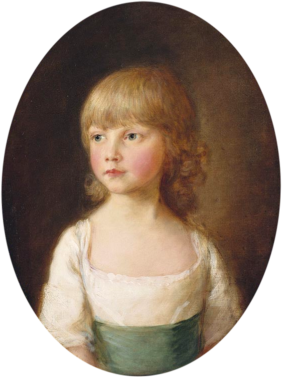 Portrait de la princessse Sophia, agée de 5 ans